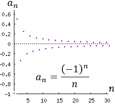 La sucesión a(n) = (-1)^n/n es una sucesión alternada. Los términos pares (es decir, a(2n)) son positivos y los términos impares (es decir, a(2n+1)) son negativos. La sucesión está acotada inferiormente por -1 y superiormente por 0.5. Es convergente a 0.